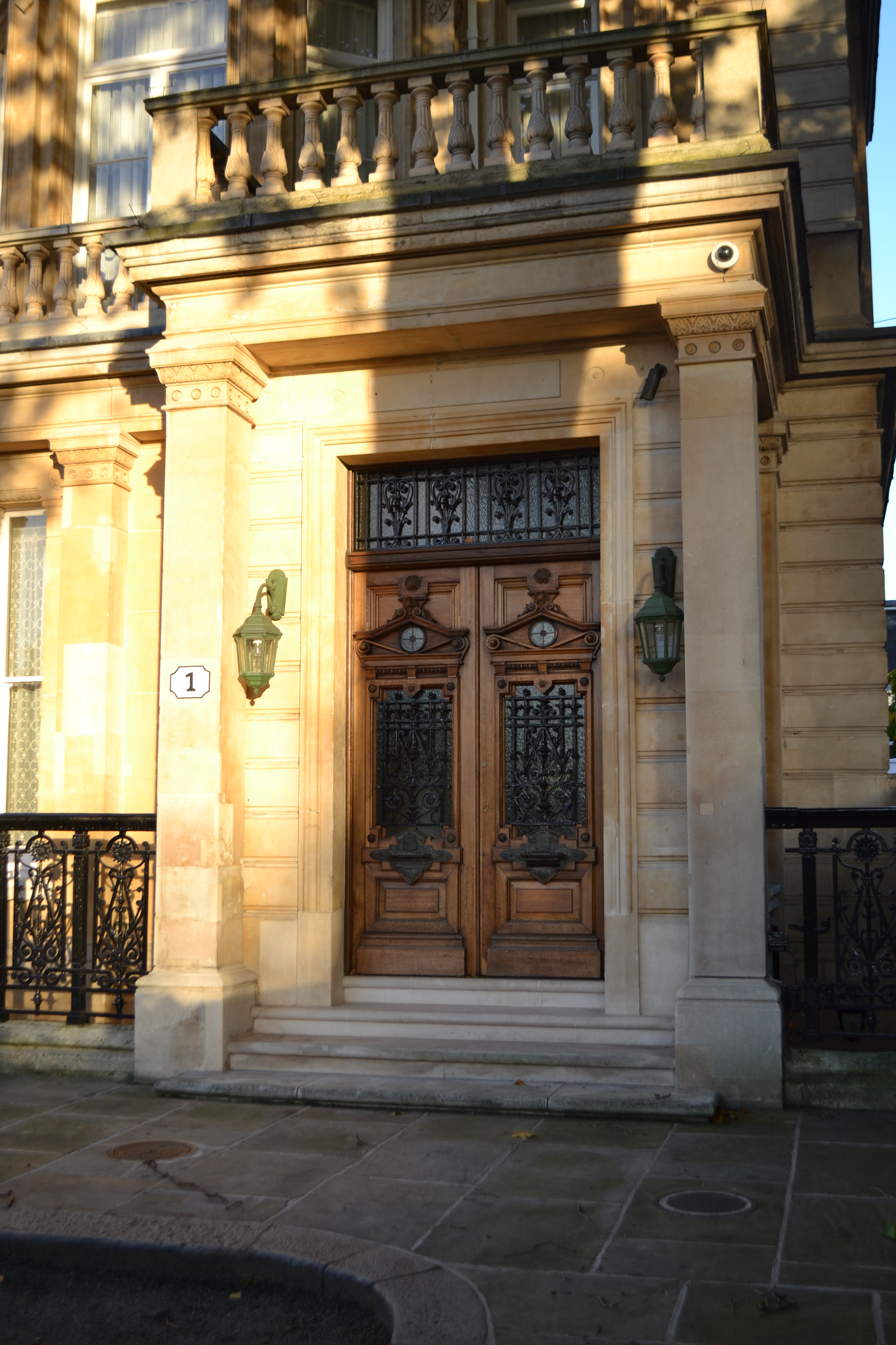 Porte du n° 1 Cambridge Gate, Londres.